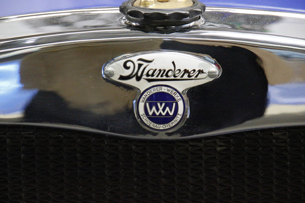 1927 Wanderer W10/I_IMG_3019